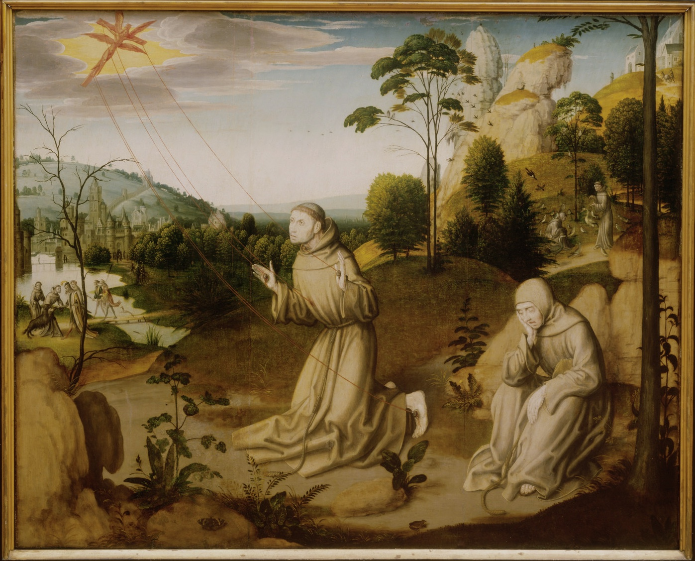 Maître de la Légende de sainte Ursule - Retable de saint François - Panneau du milieu